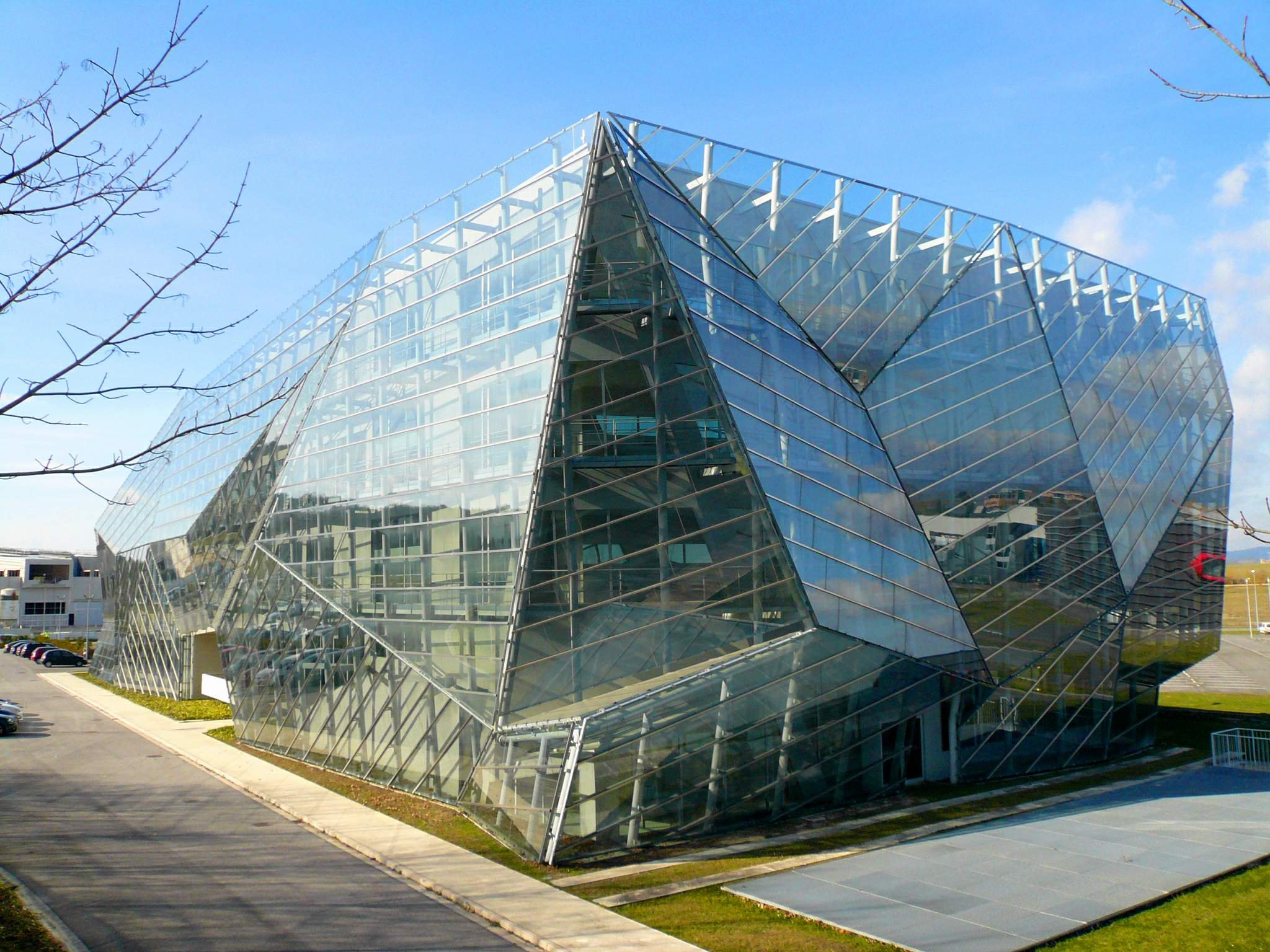 Parque Tecnológico de Álava (Miñano Menor, Vitoria, Álava, País Vasco): Edificio E8 Jocelyn Bell (TSK Energy Solutions). Inaugurado en 2011, el edificio acogió primero la filial Power Plants de Ingeteam Power Technology, S.A., la cual fue adquirida en 2017 por TSK, Electrónica y Electricidad (Grupo TSK) dando lugar a TSK Energy Solutions, S.L.